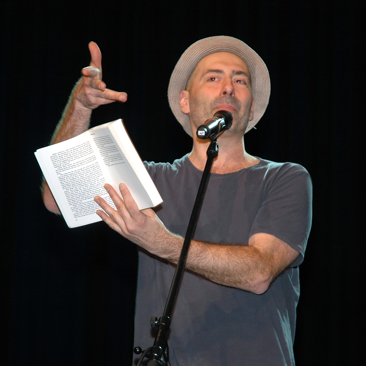 FIL Philip Tägert bei seinem Auftritt auf der Internationalen Kulturbörse in Freiburg 2012